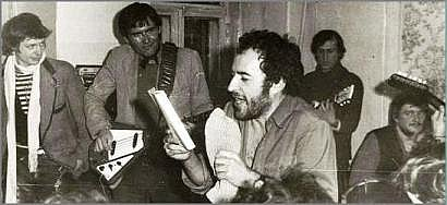 Панкфестиваль в Зеленограде 1983